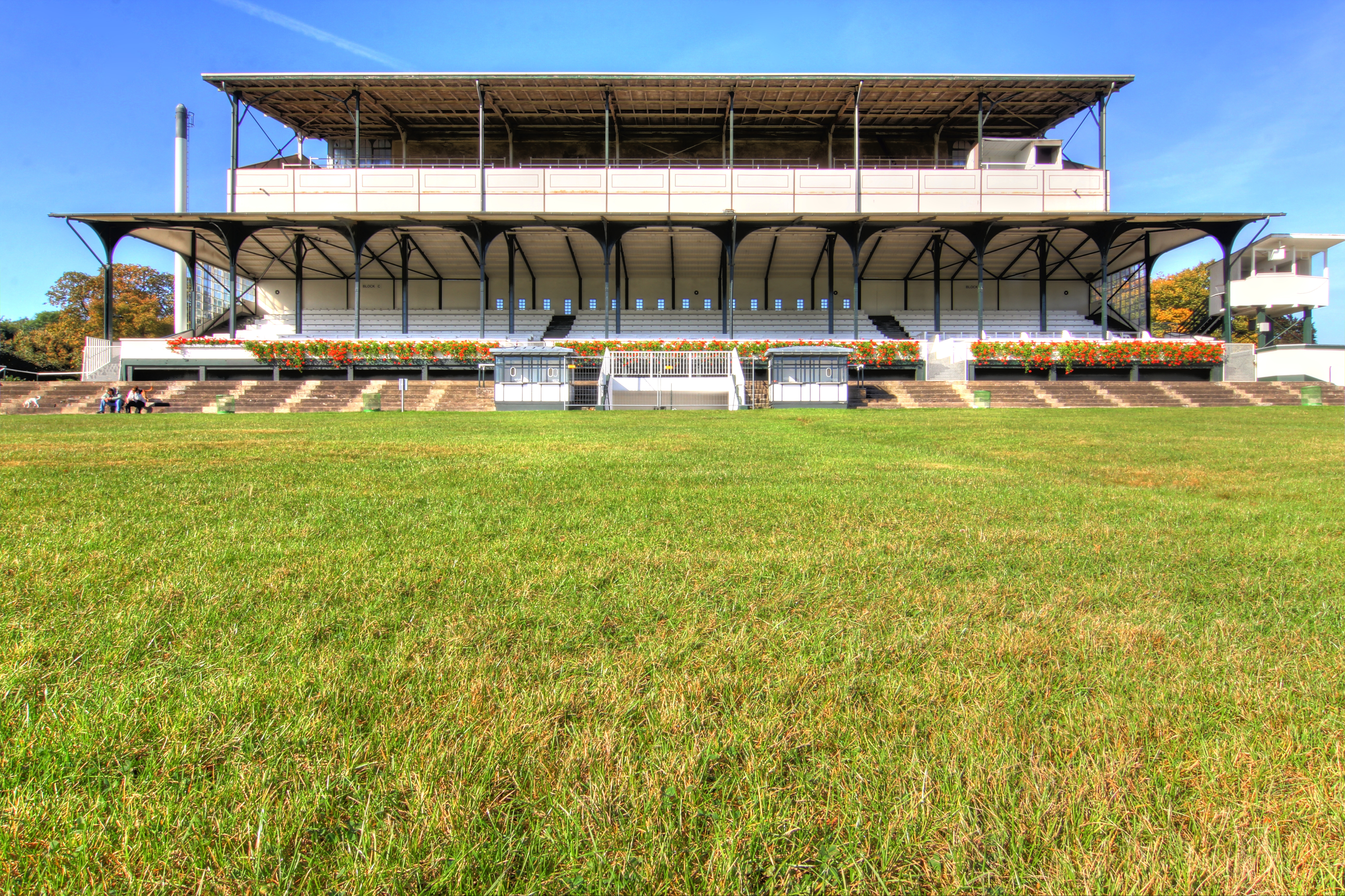 Hofanlage (Rest), Kleindenkmal, Reitsportanlage/ Rennbahn, Rennbahnstr. 56This is a photograph of an architectural monument.